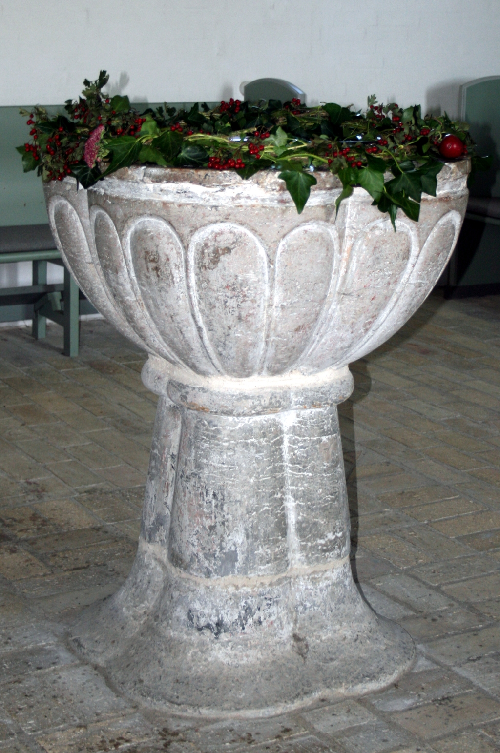 Mittelalterlicher Taufstein der Rimberti-Kirche in Emmelsbüll